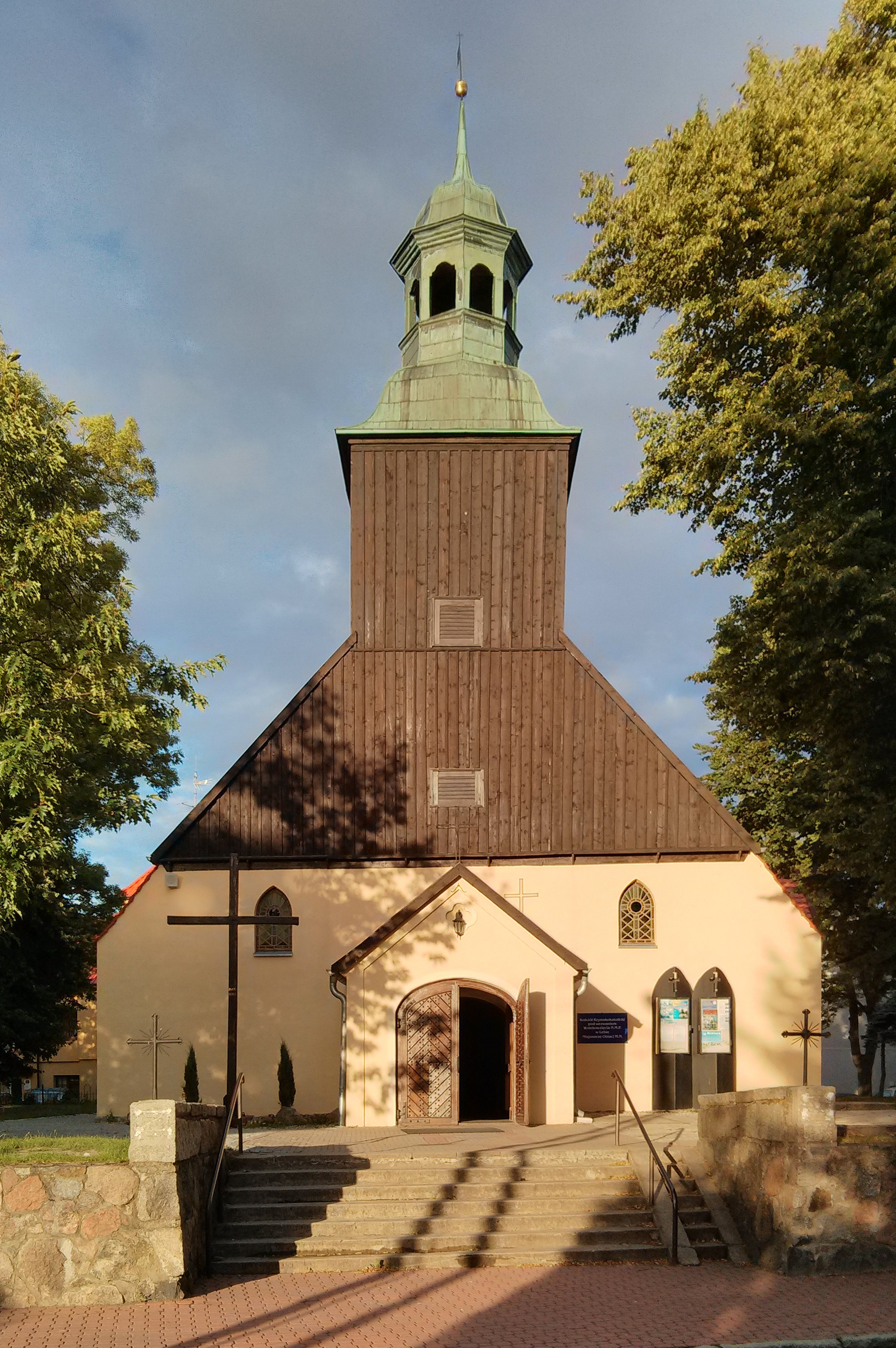 Łeba, kościół par. p.w. Wniebowzięcia NMP, 1683, 1763, 1912